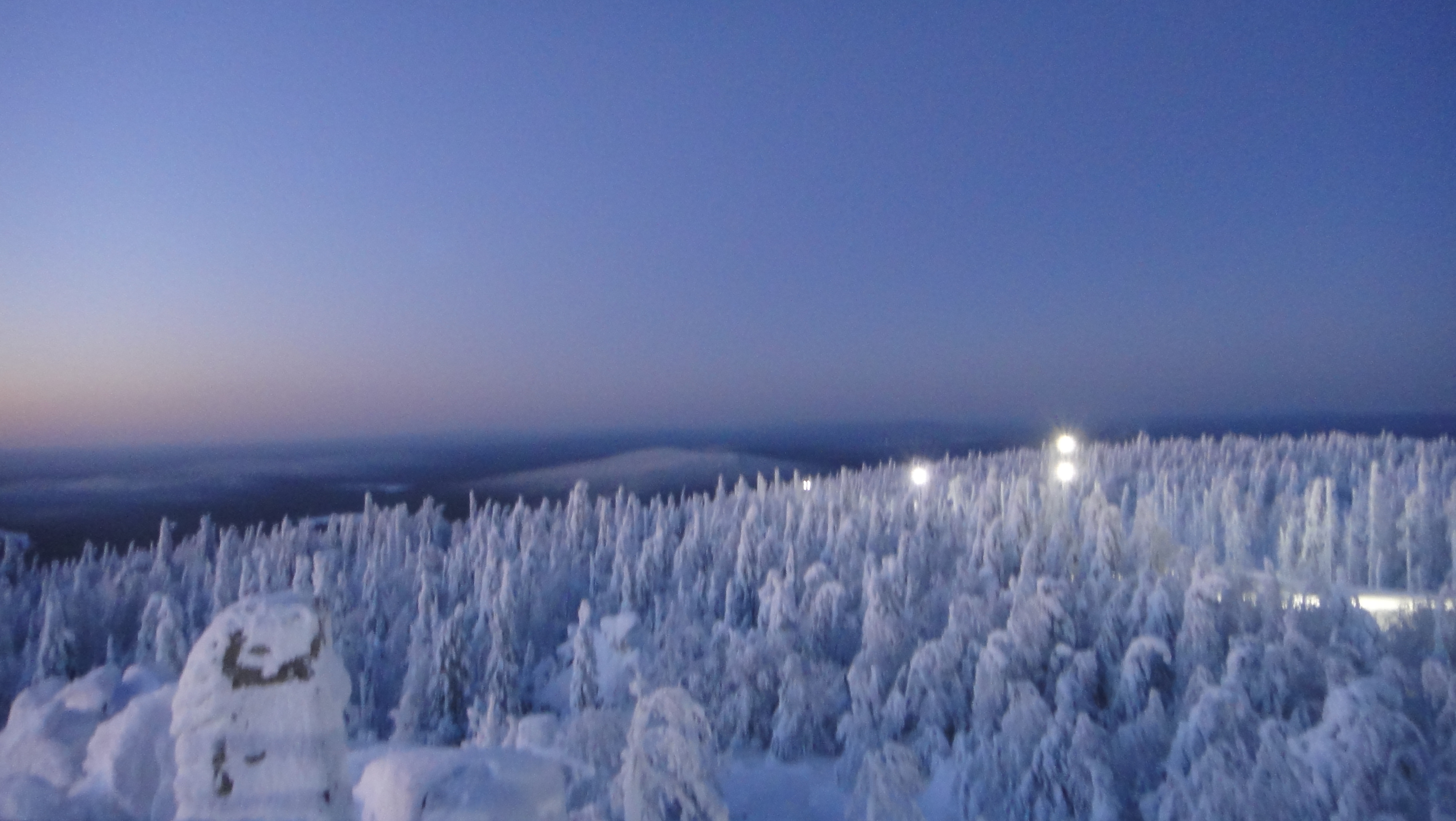 ГЛК Гора белая, Горнолыжная трасса 1А, Вид со смотровой площадки